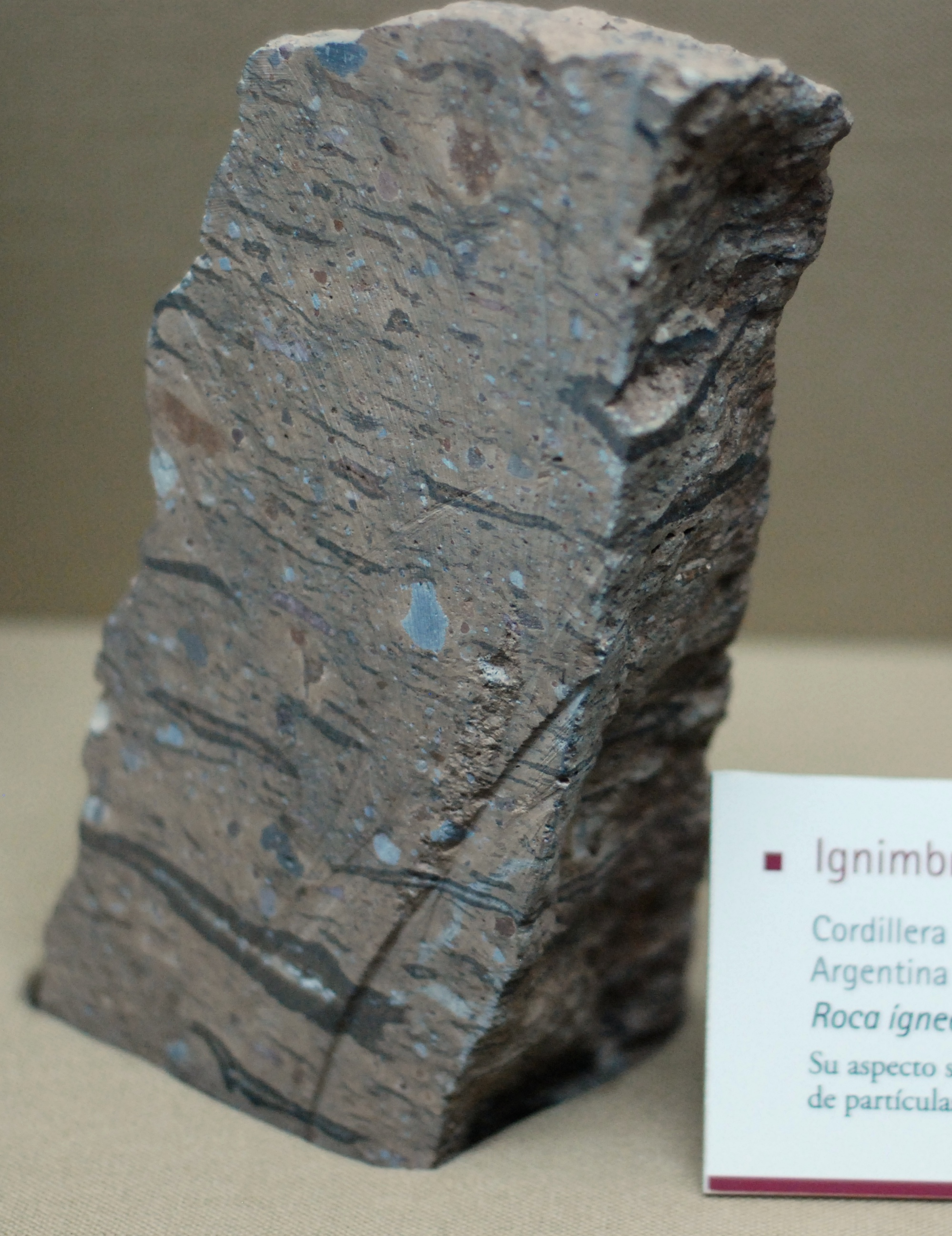 Ignimbrita. Roca ignea volcánica. Su aspeto señala un flujo caliente de partículas volcánicas y gases. Cordillera frontal de San Juan, Argentina.